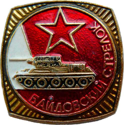 Знак отличия снайпера-танкиста 68-го гвардейского танкового полка. "Байдовский стрелок". (Нагрудный знак)